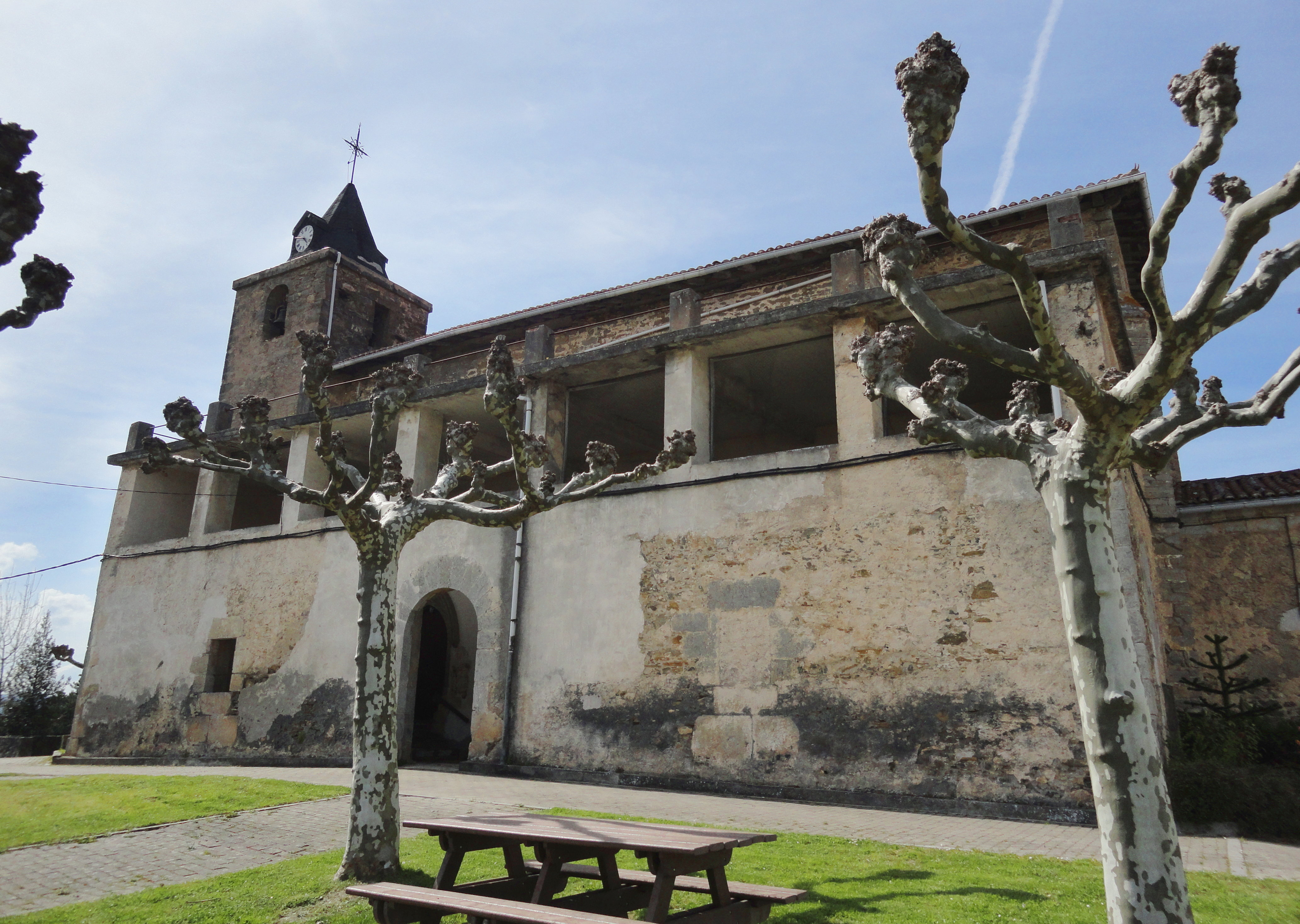 San Miguel eliza - Gaintza